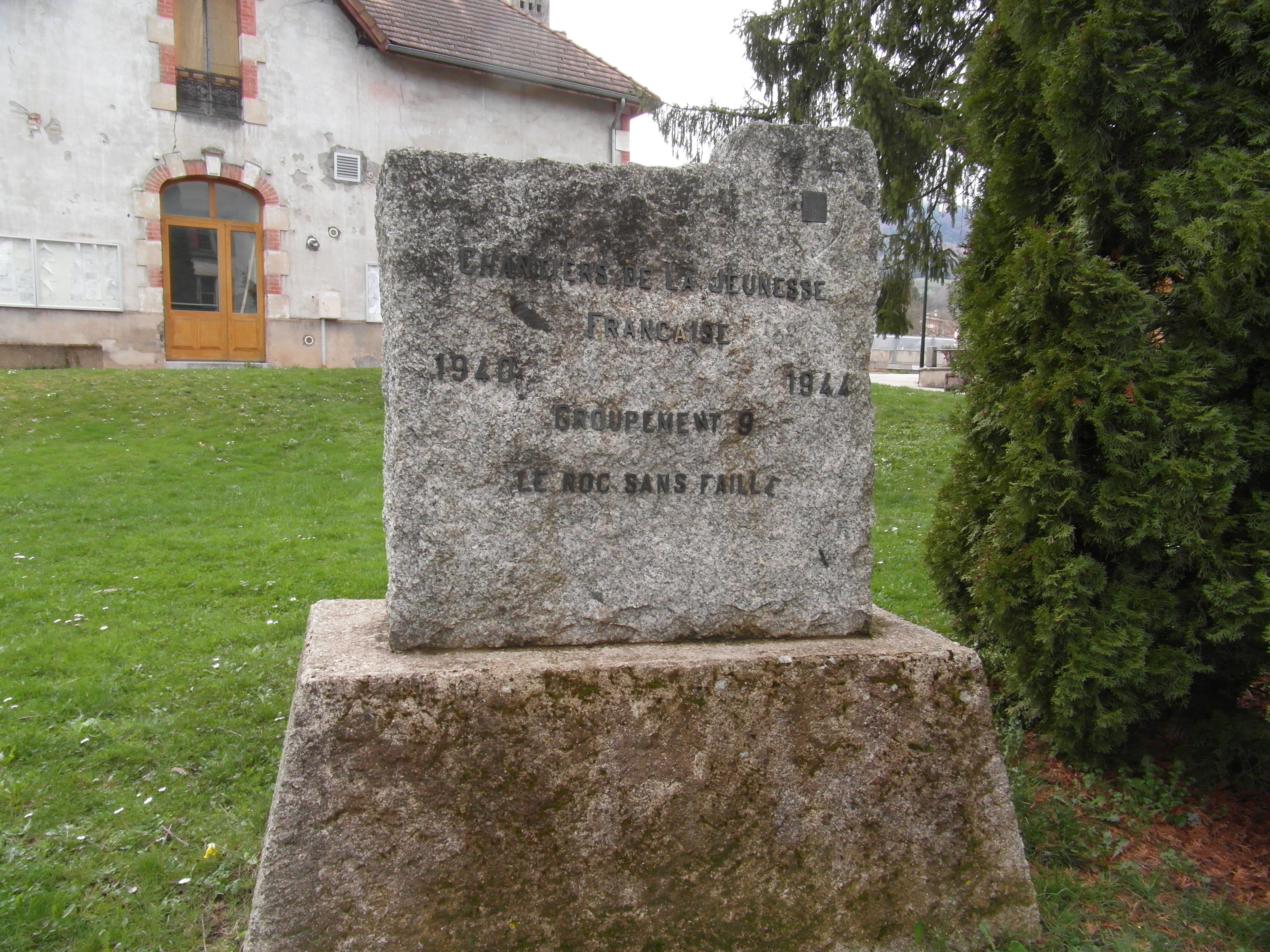 Monument de chantier de jeunesse de Monestier